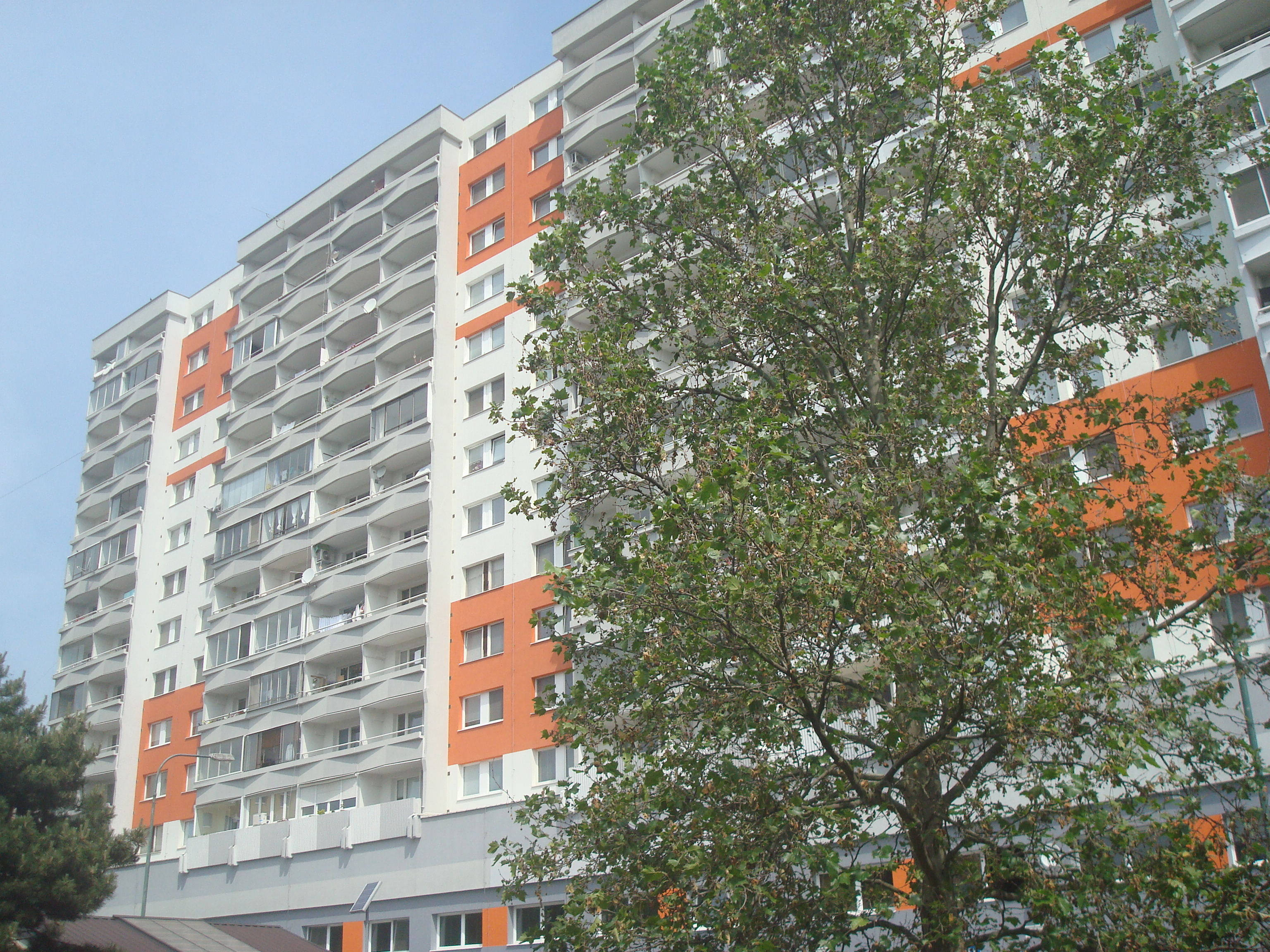 Lenardova street, Petržalka, Bratislava, Slovakia